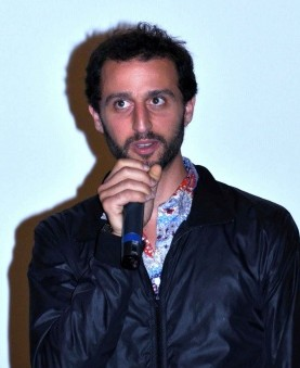 Arie Elmaleh.